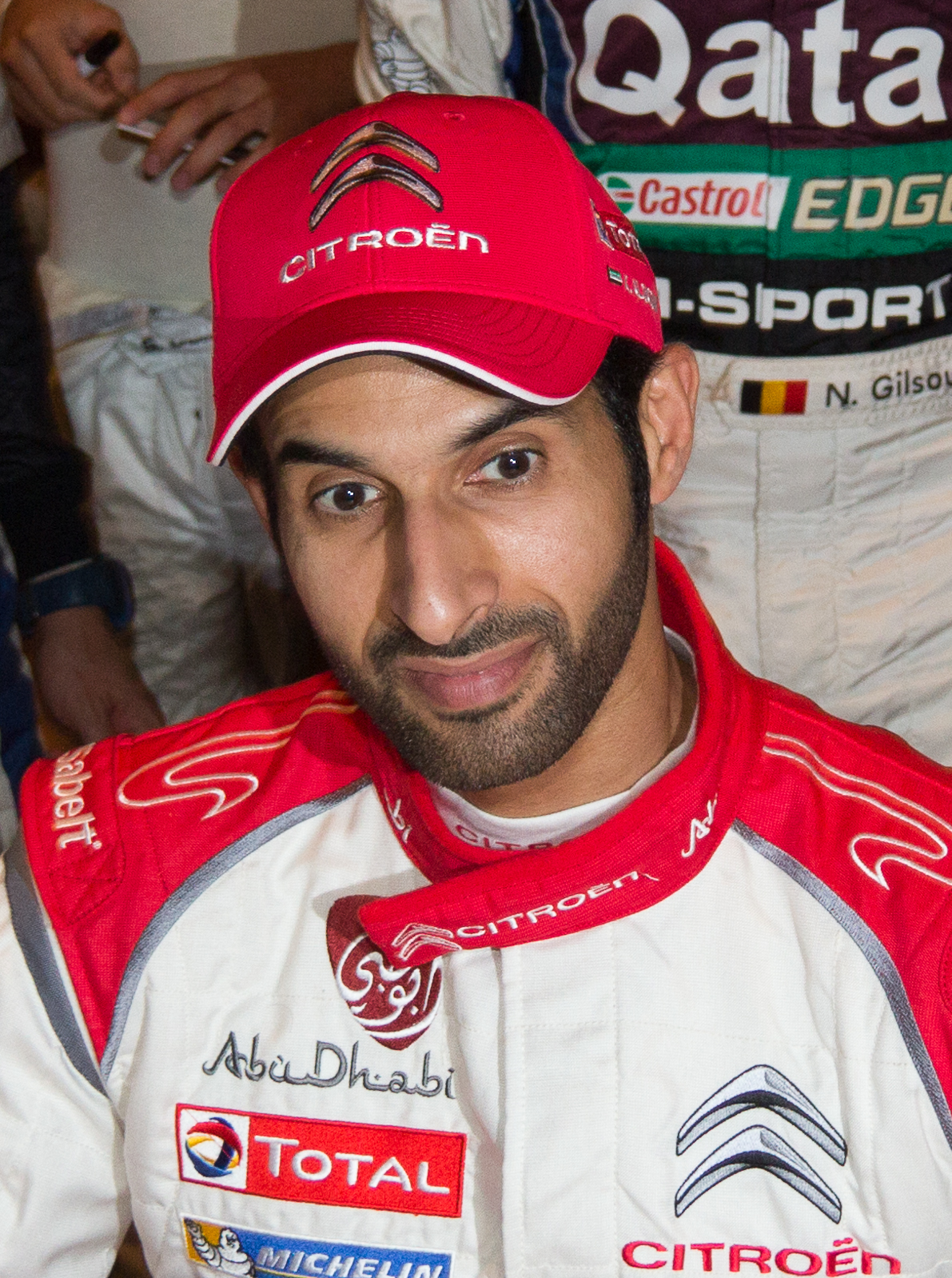 ADAC Rallye Deutschland 2013 - Empfang der Stadt Köln - Khalid Al Qassimi.